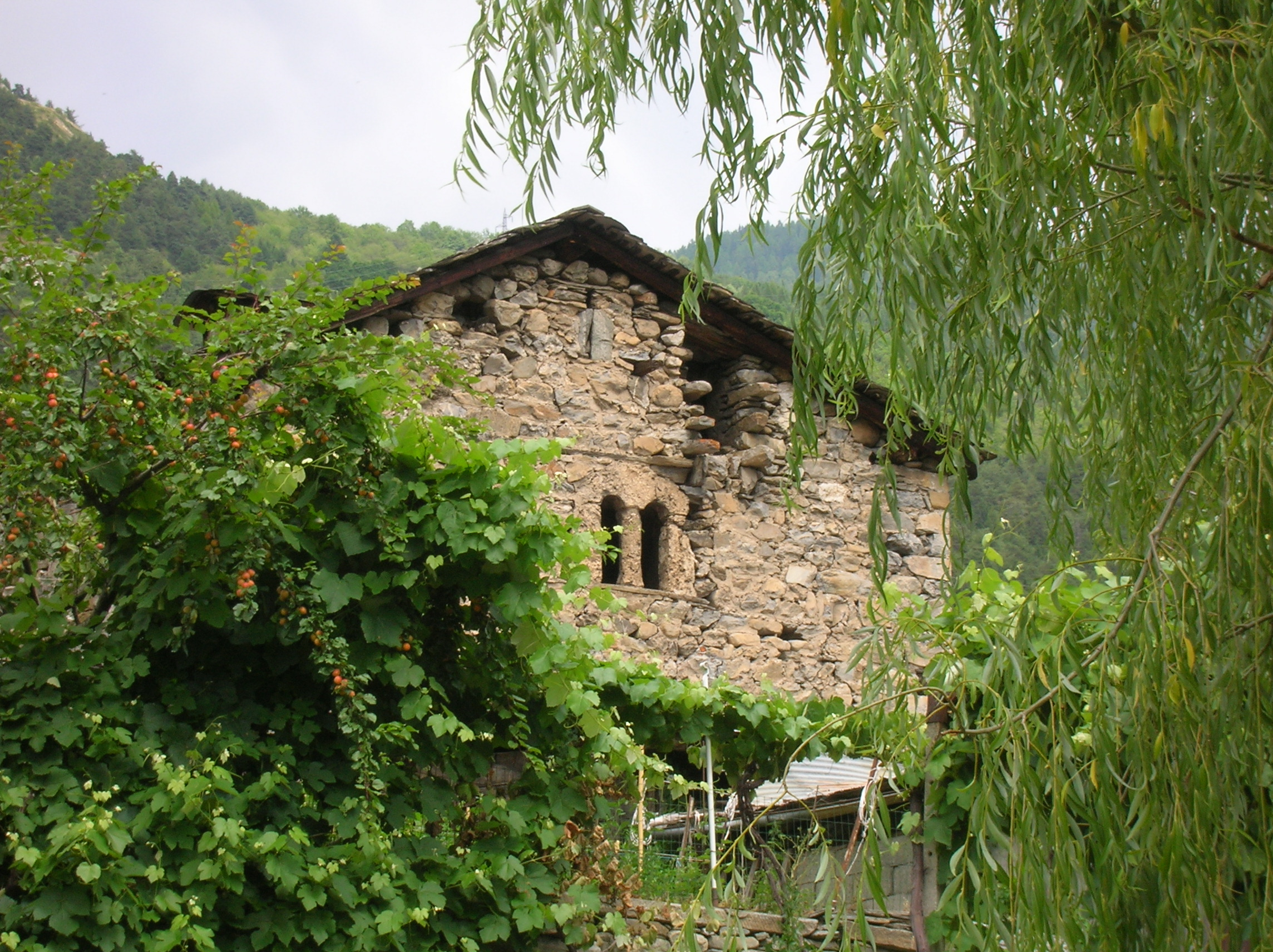 Casaforte Bozel (facciata sud), Morgex, Valle d'Aosta, Italia.